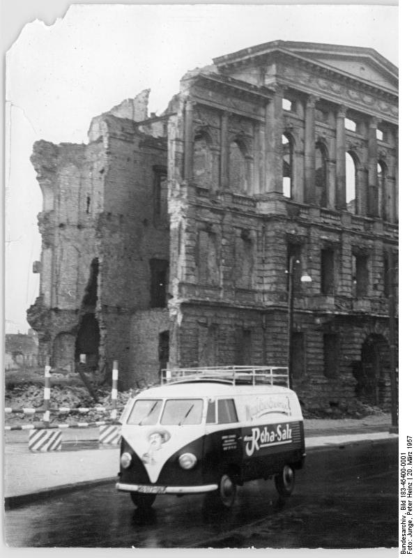 Berlin, Friedrich-Ebert-Straße, Ruine Zentralbild Junge 20.3.1957 Ehemalige Botschaft der USA, Berlin Blick auf die Ruine des Palais Blücher, der ehemaligen Botschaft der USA in Berlin, Pariser Platz 2 Ecke Friedrich-Ebert-Straße 21. (Aufgenommen am 18. März 1957)